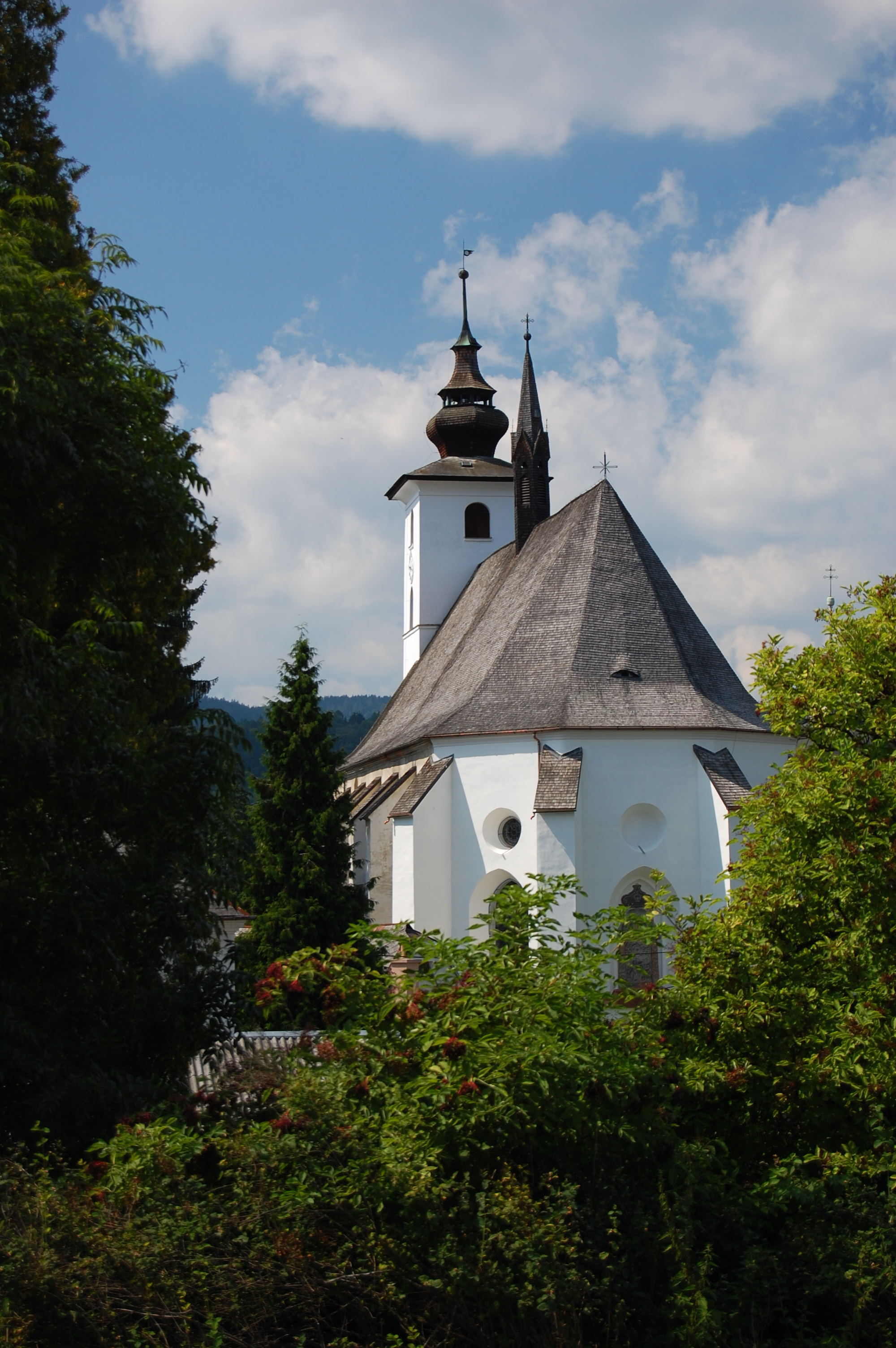 Kostel Svatého Jana Křtitele, Velké Losiny, okres Šumperk